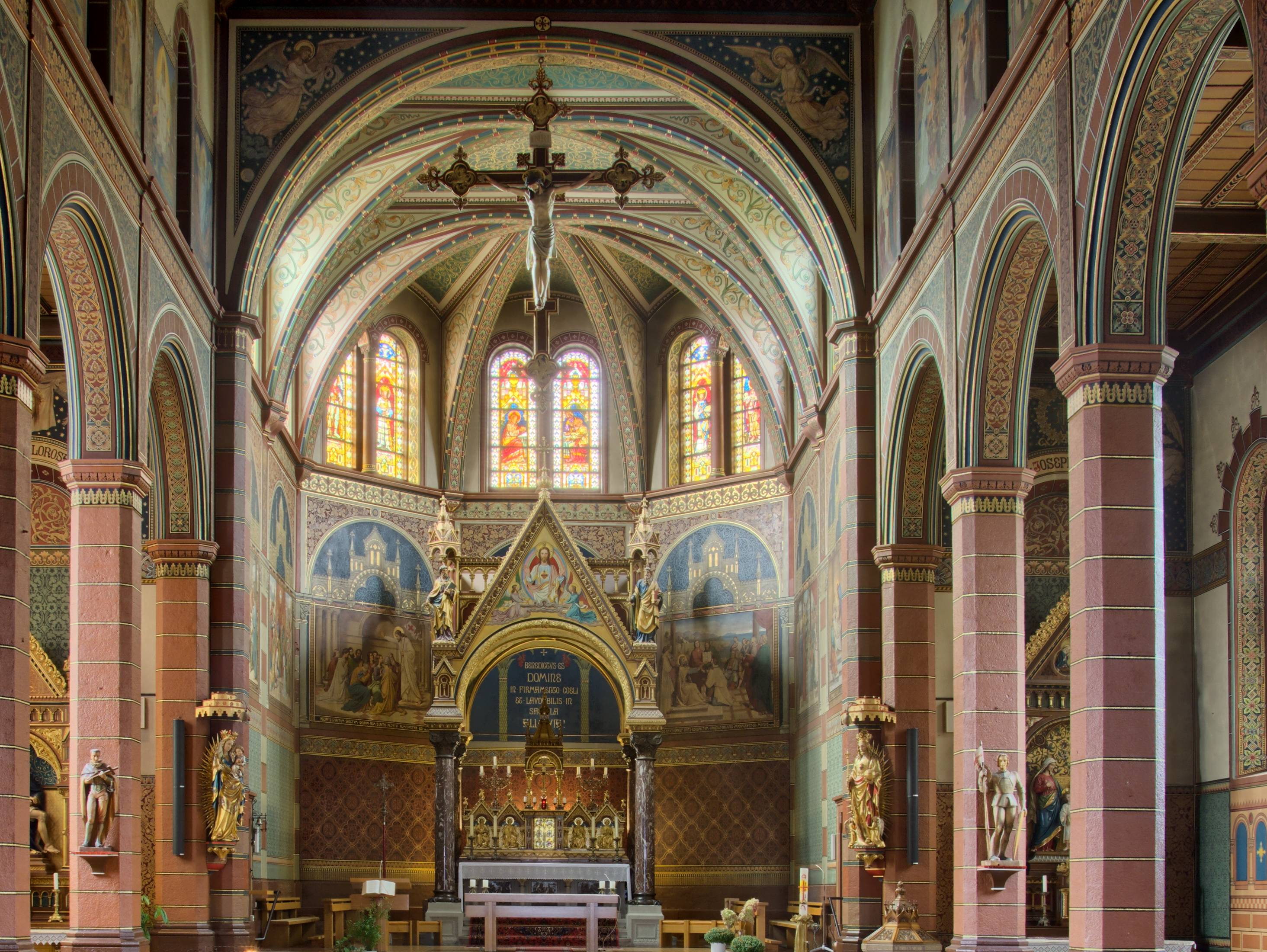 St. Peter und Paul in Bonndorf Blick zum Altar